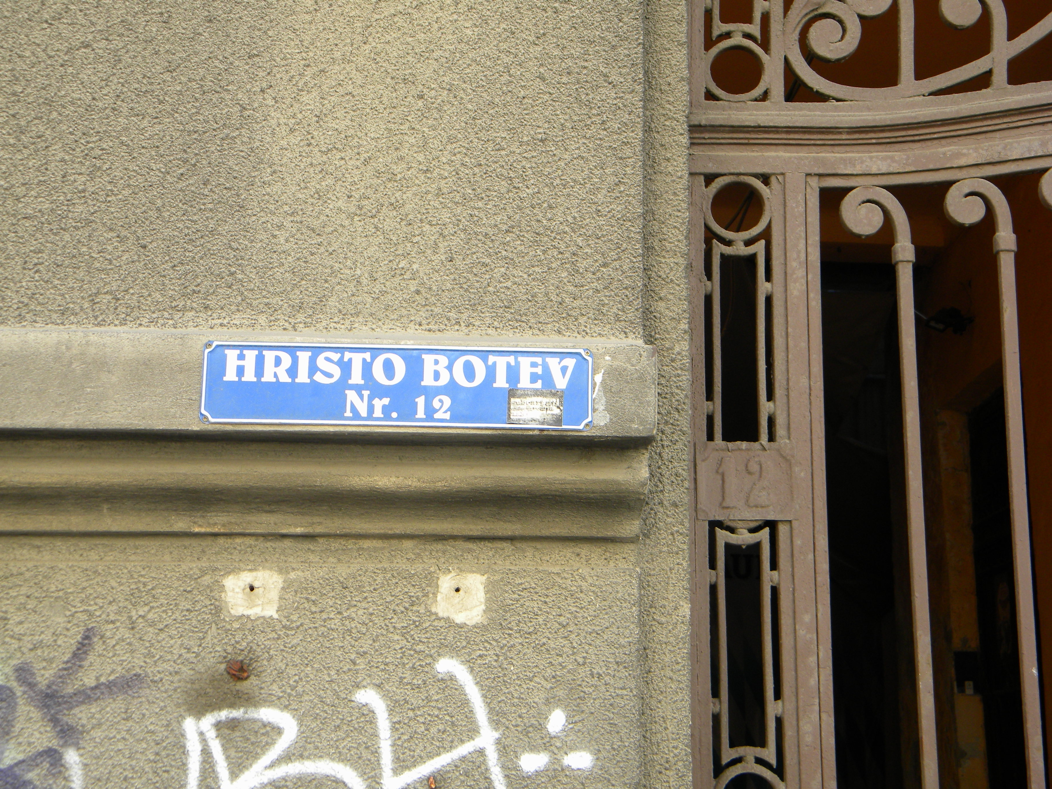 Bucuresti, Romania, Strada Hristo Botev nr. 12 (imobil), sect. 3 (detaliu)